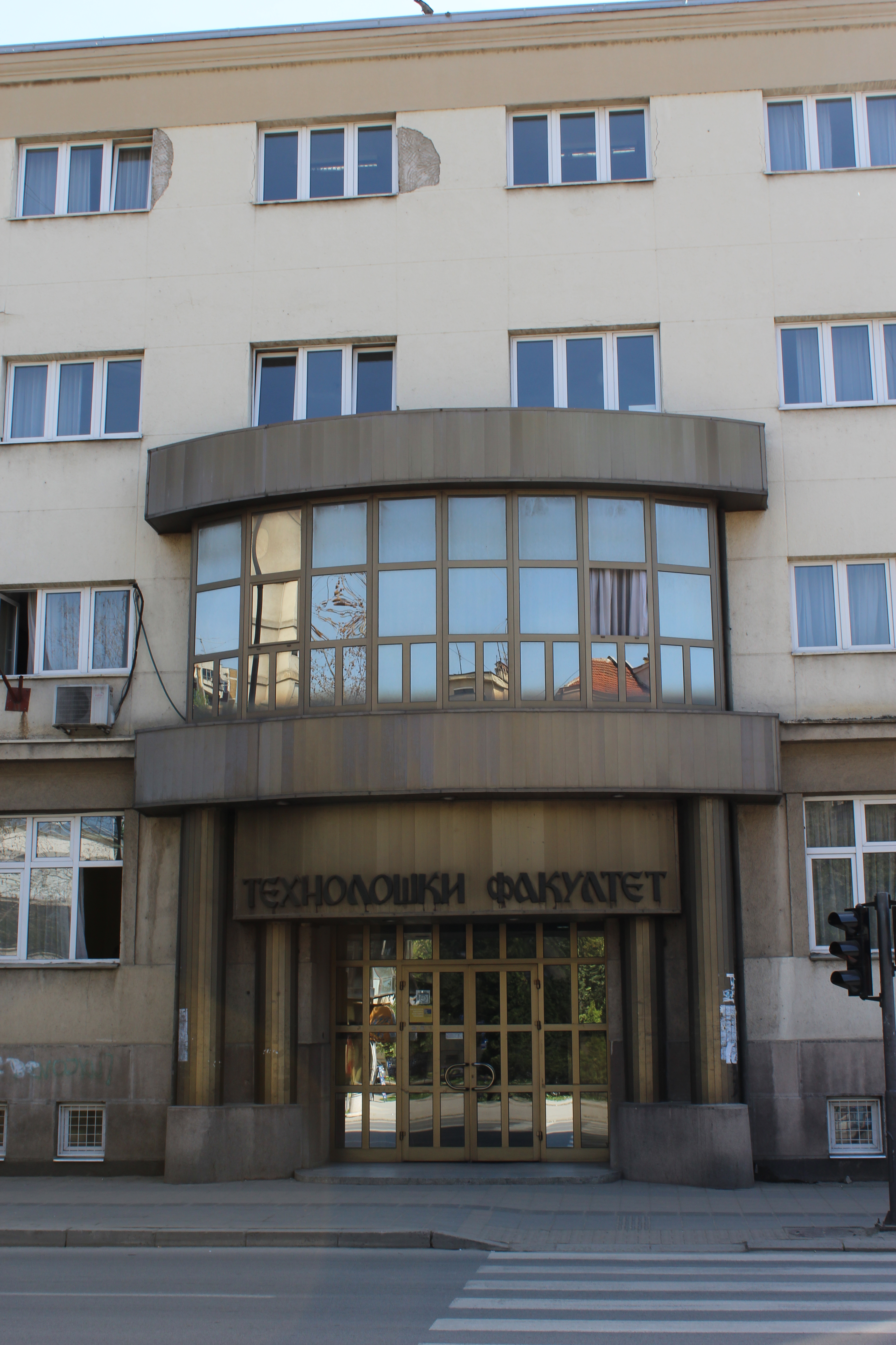 Nova zgrada Tehnološkog fakulteta u Leskovcu.